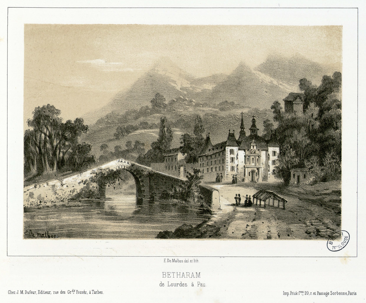 Fait partie d'un recueil de 29 lithographies en camaïeu. Pl. 4 et 16 dessinées par Séguin et lithographiées par Deroy. Pl. 17 lith. par Deroy. Titre lithographié Pendant la saison thermale se vend à Bagnères, Barèges-Luchon, Cauterets et Eaux-Bonnes. Pl. imprimées chez Frick frères à Paris. Ancely, René (1876 - 1966). Possesseur